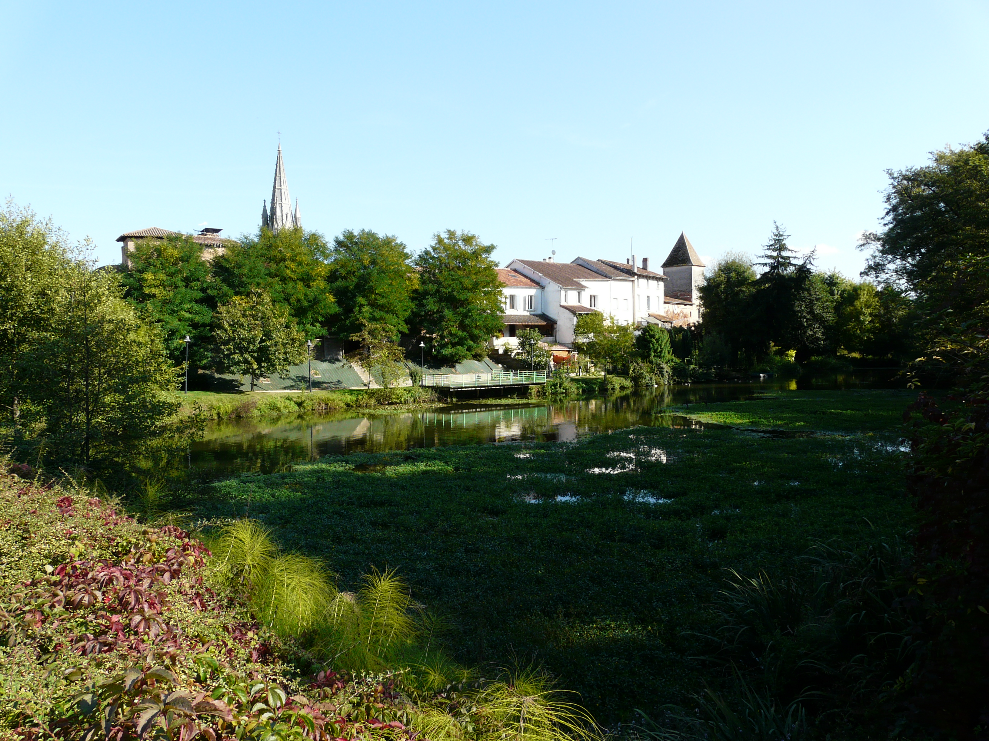 Le Temple-sur-Lot